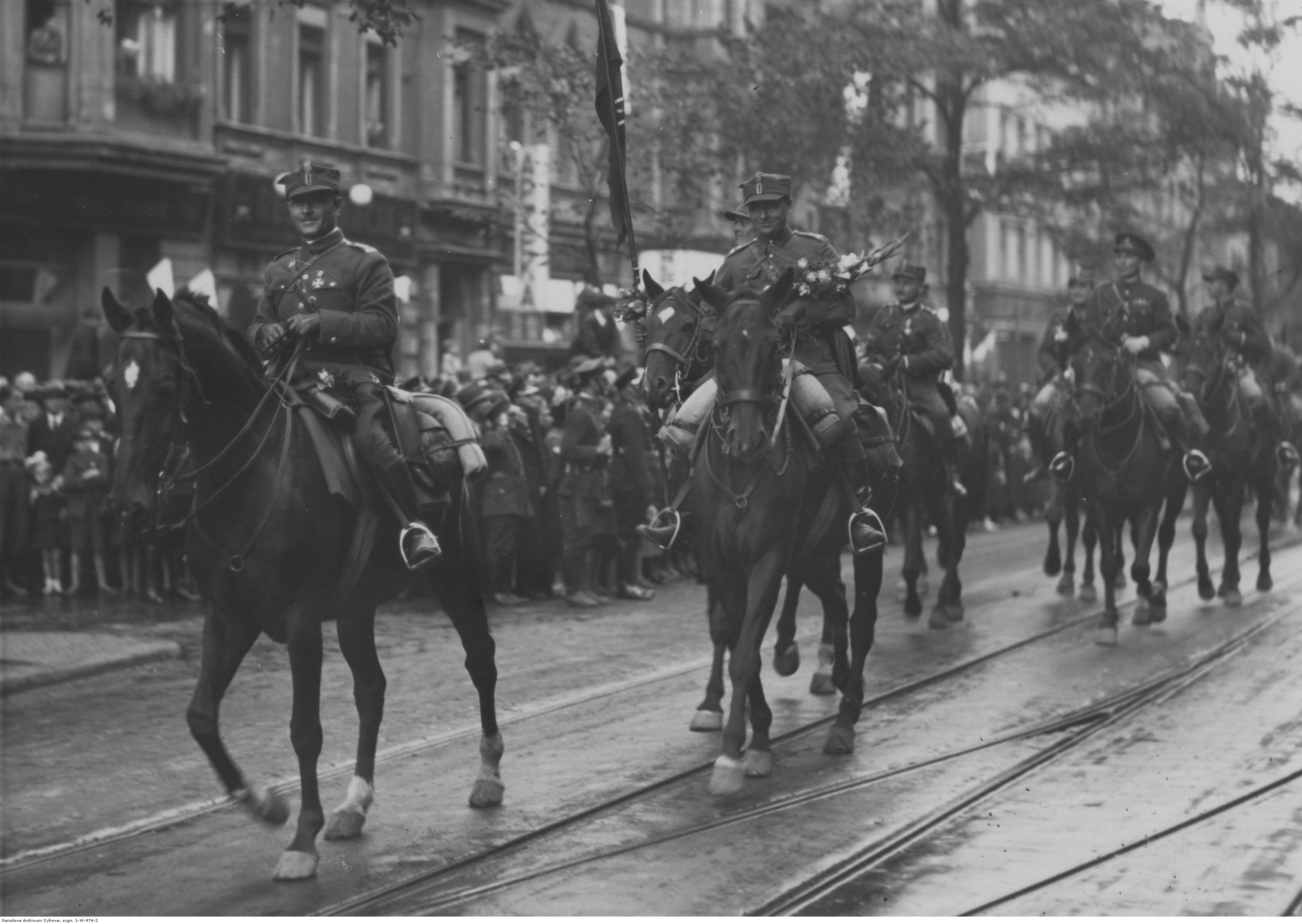 Powitanie w Katowicach 23 Górnośląskiej Dywizji Piechoty powracającej z manewrów. Płk Jan Jagmin-Sadowski na czele oddziału konnego piechoty górskiej. Koncern Ilustrowany Kurier Codzienny - Archiwum Ilustracji. Sygnatura: 1-W-974-2